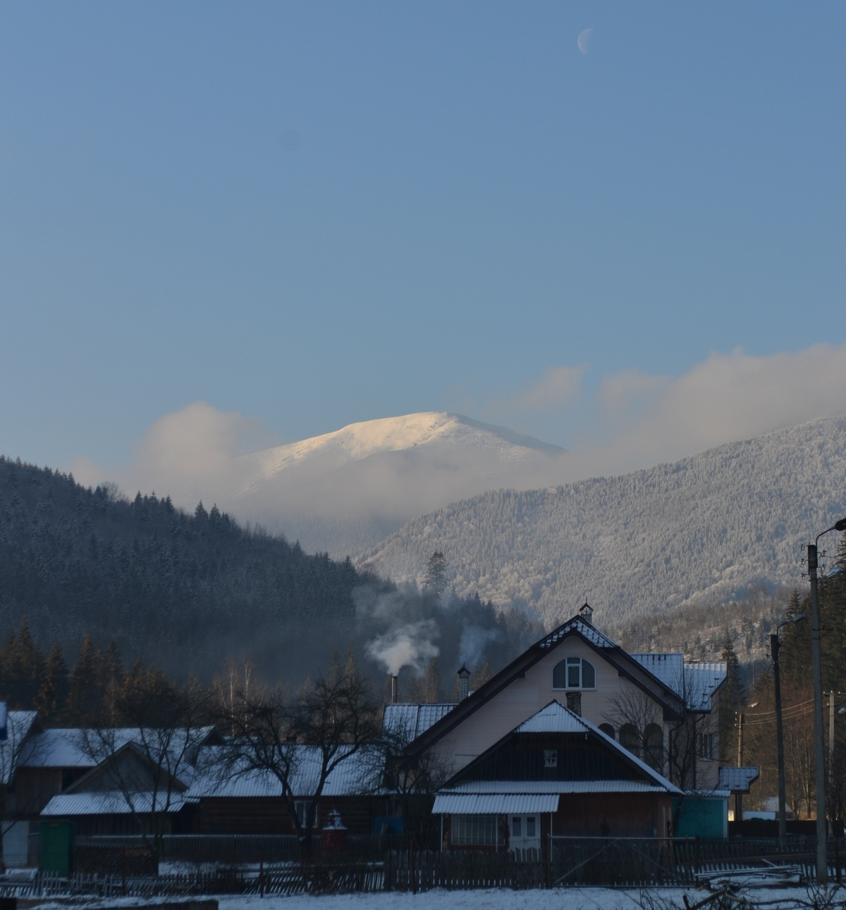 Молода́ — гора в Українських Карпатах, в масиві Ґорґани. Розташована в Рожнятівському (частково Долинському) районі Івано-Франківської області, на захід від села Осмолоди. Висота 1723 м